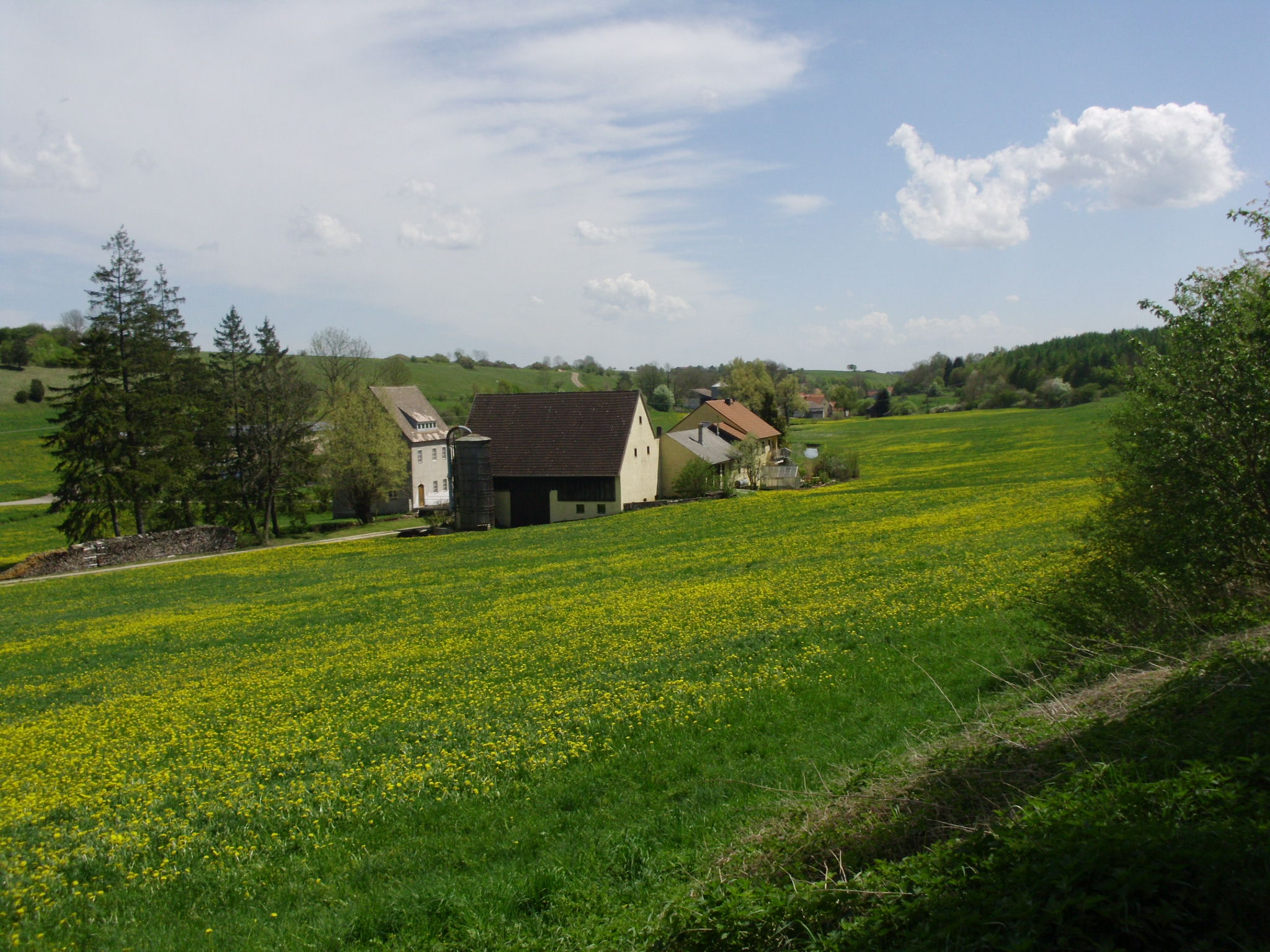 Steinmühle an der Anlauter, Ortsteil von Nennslingen im mittelfränkischen Landkreis Weißenburg-Gunzenhausen